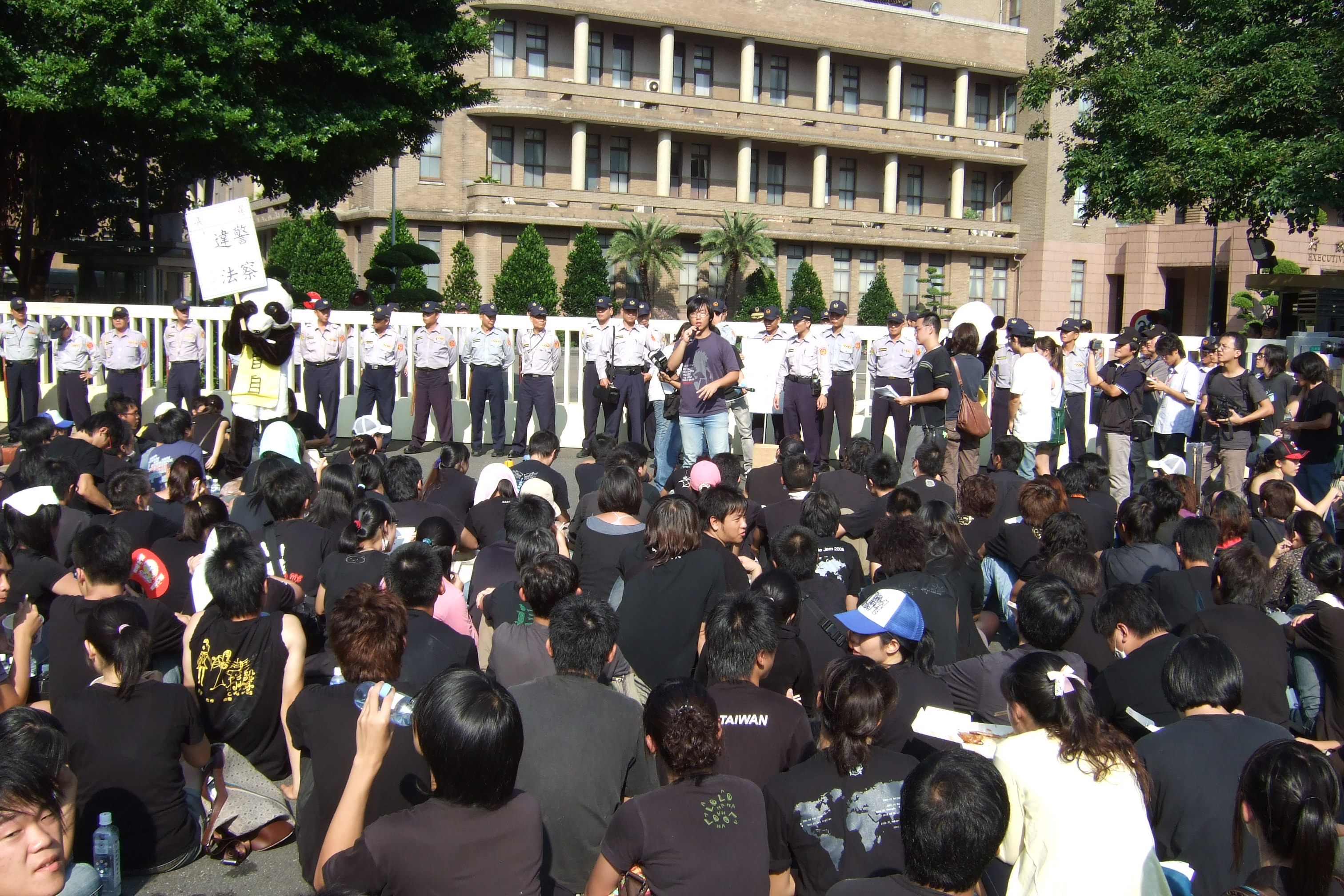 1106爭人權反集遊法靜坐第一天的靜坐場面。